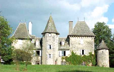 Chateau Lamartinie facade Ouest